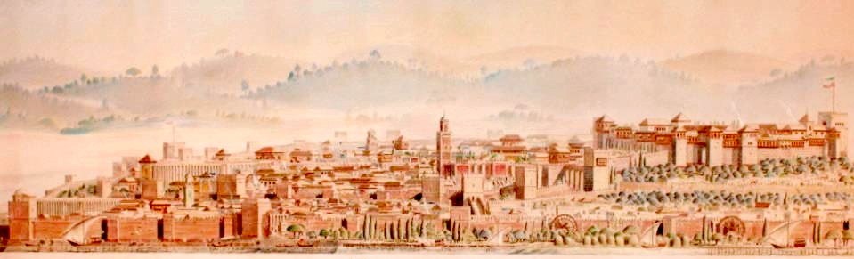 Ville de Silves - Maures